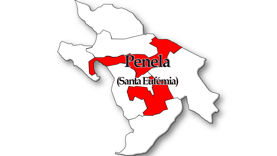 População